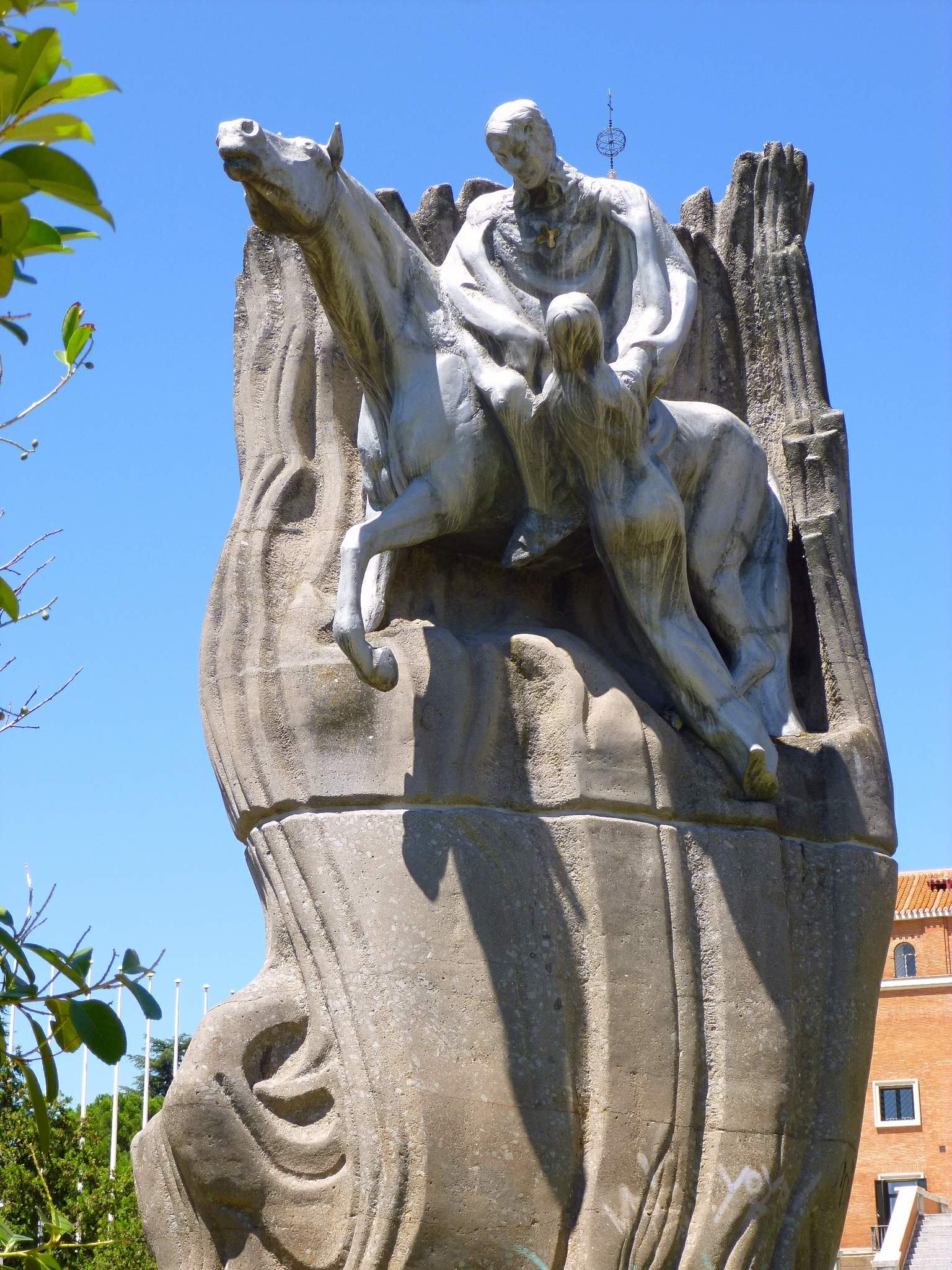 Monumento a la Hispanidad, junto al Museo de América (Madrid)